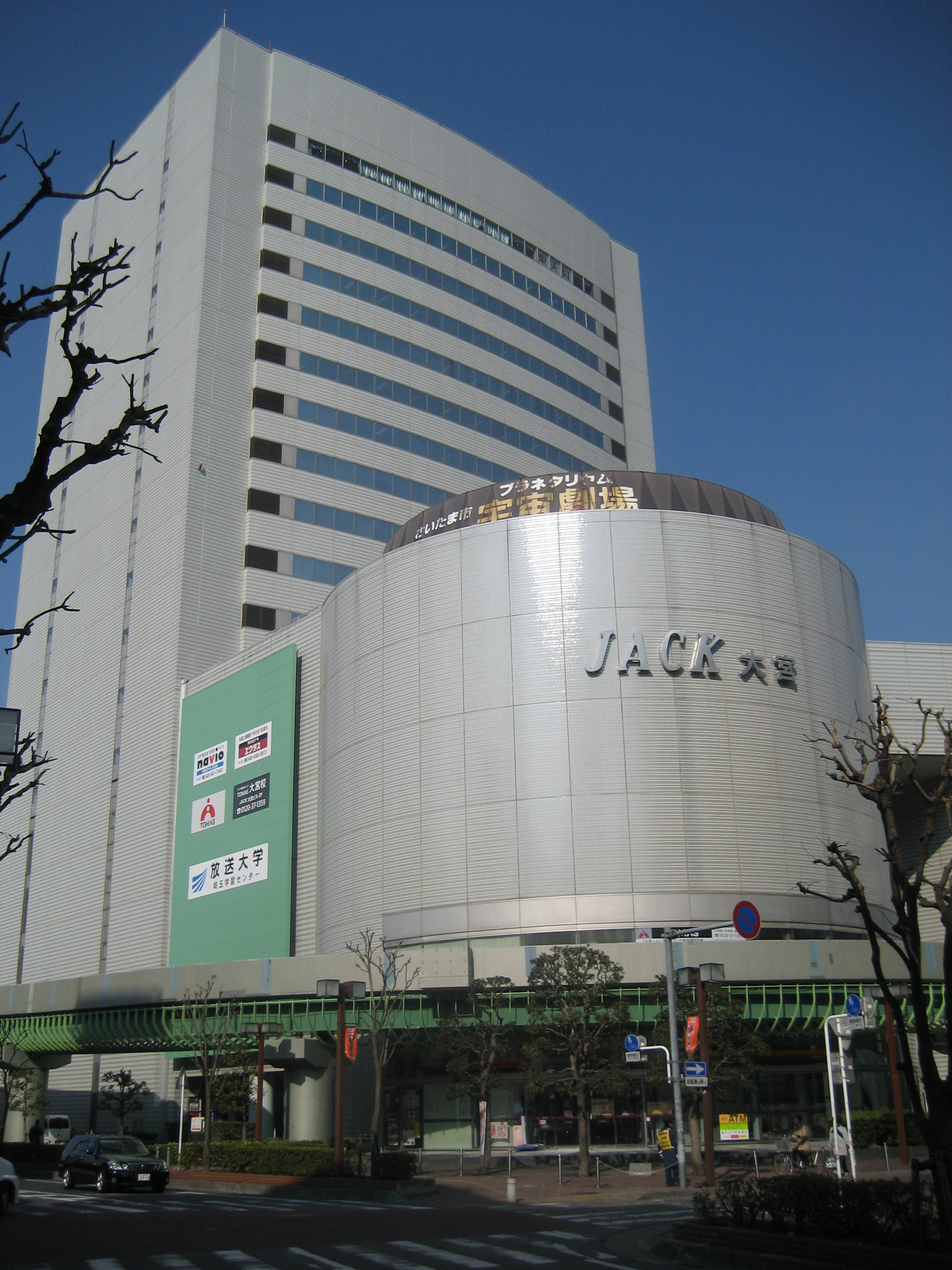 JACK大宮外観